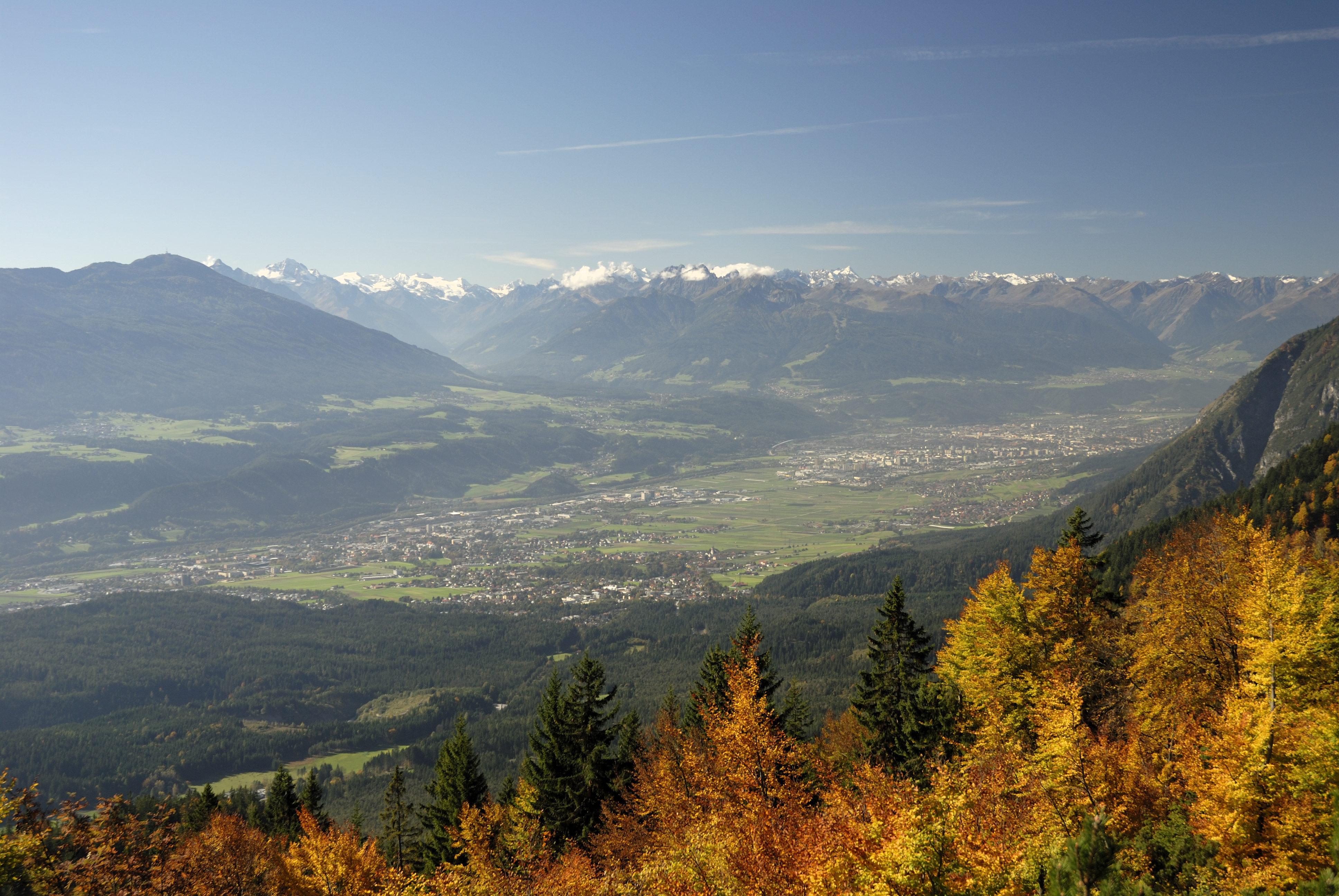 Blick von der Hinterhornalm auf Innsbruck, Hall in Tirol, Absam und die Stubaier Alpen